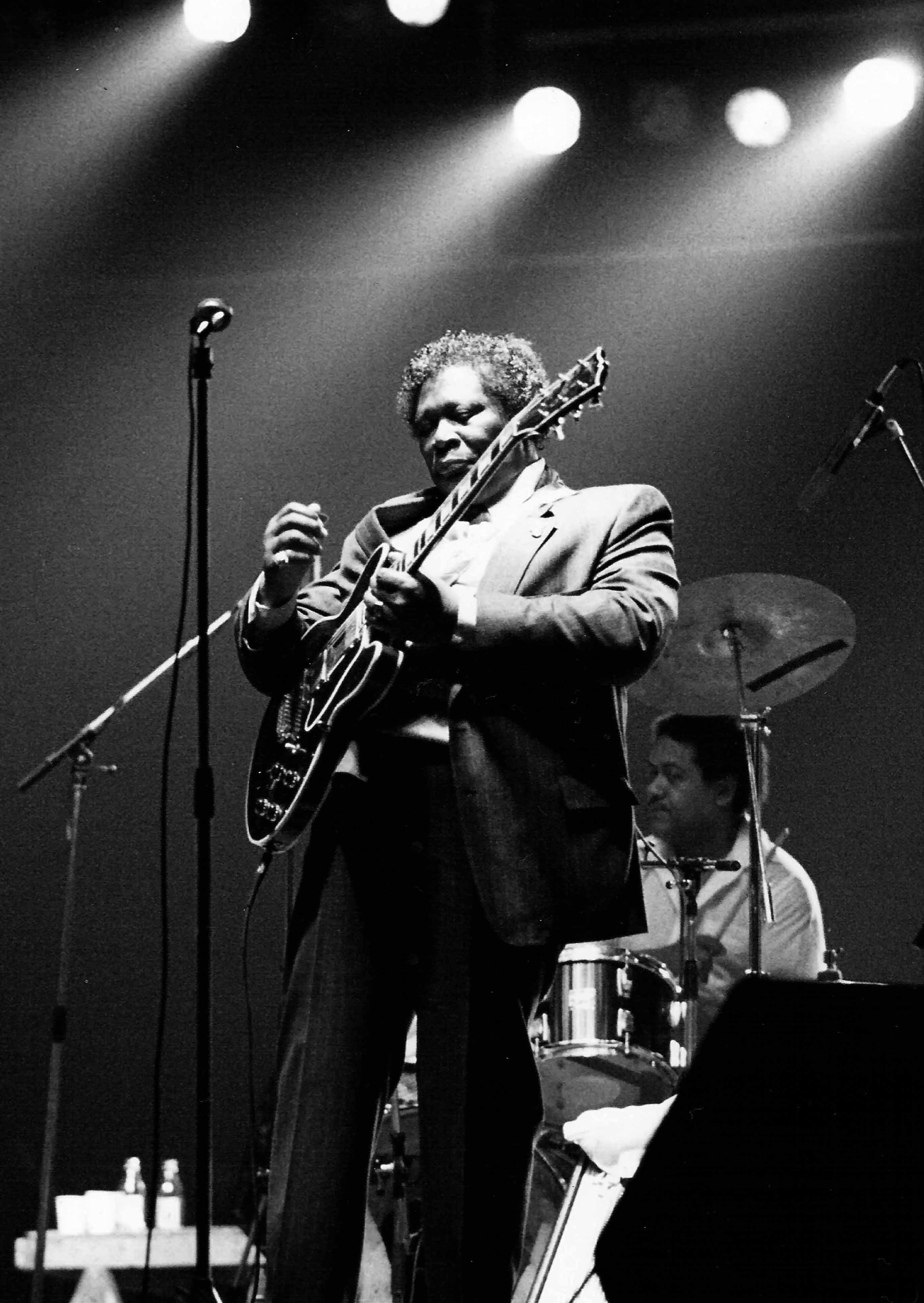 El considerado rey del Blues con su inseparable Lucille. Author: F. Antolín Hernandez (Soy consciente de que la calidad de las imágenes no es muy buena, pues están escaneadas de fotos de 400 ASA ya antiguas, pero es que me hacía ilusión subirlas). Camara: Olympus OM2 Objetivo: OM 135mm 2.8